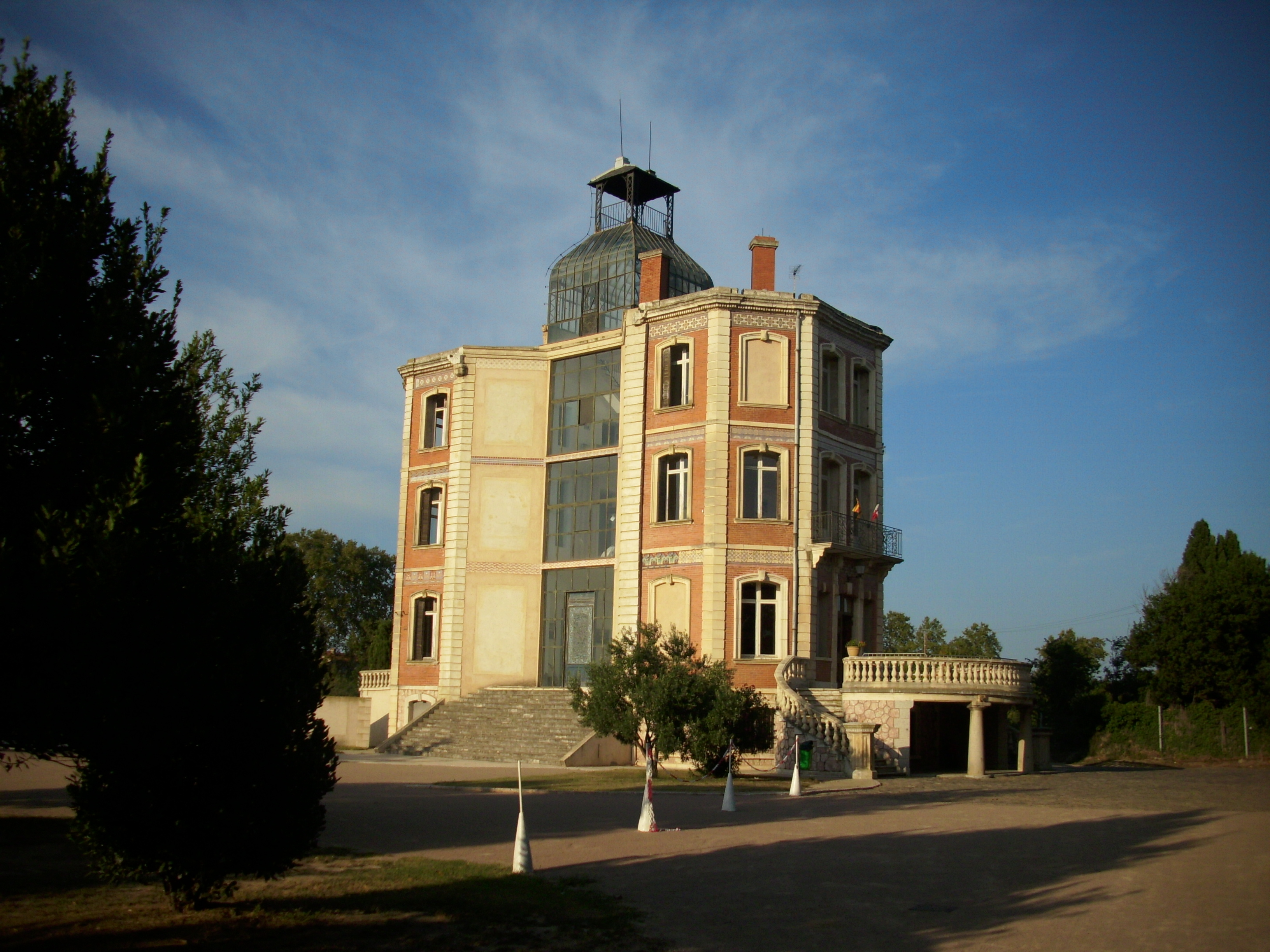 Photographie de l'extérieur de la Maternité Suisse d'Elne.